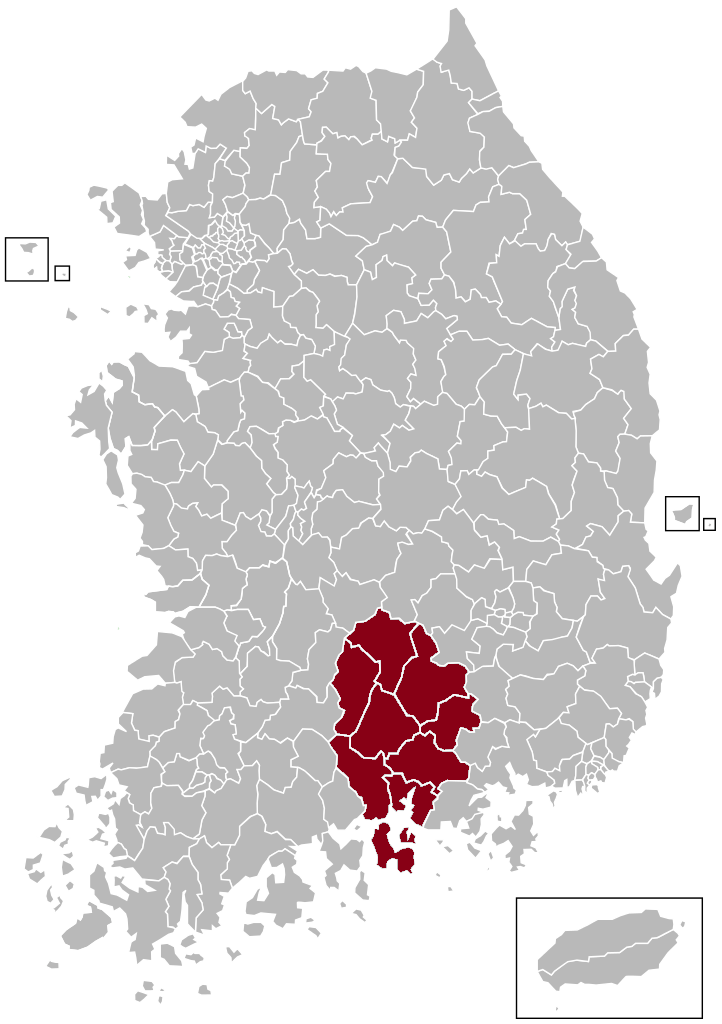 진주우편집중국 관할구역 지도